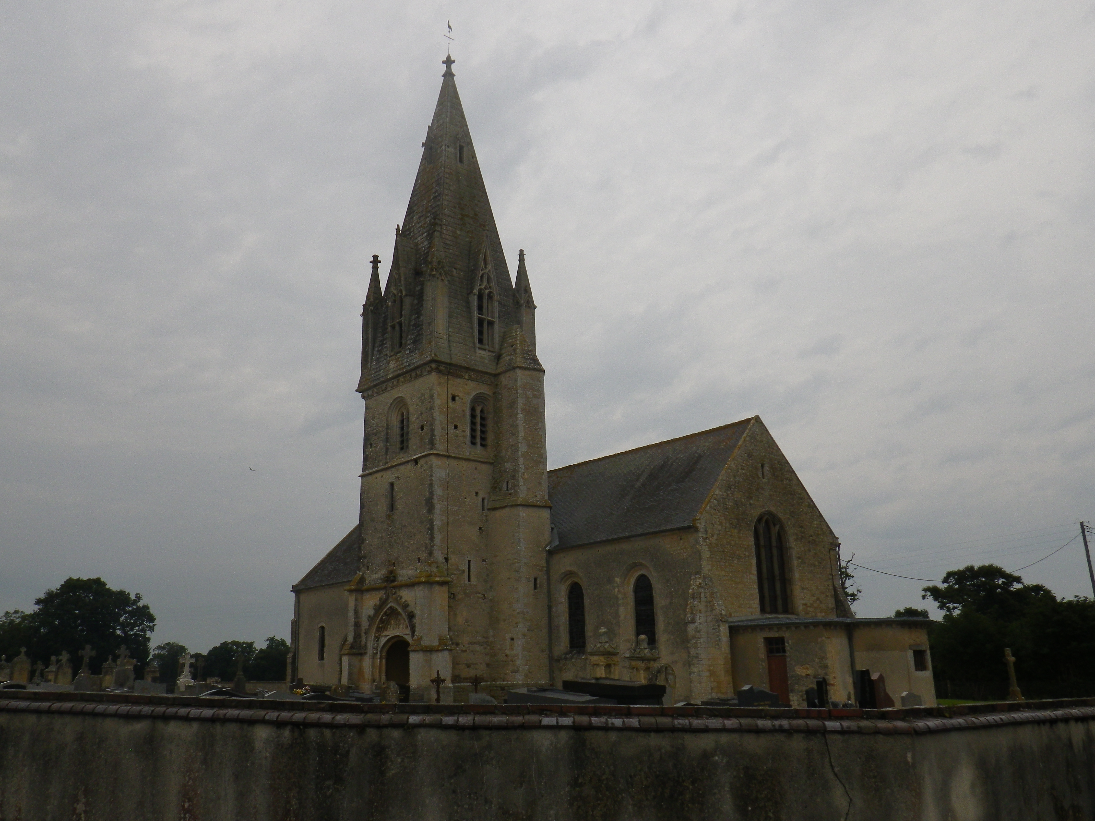 Église Saint-Pierre de Bricqueville (Calvados, France) .